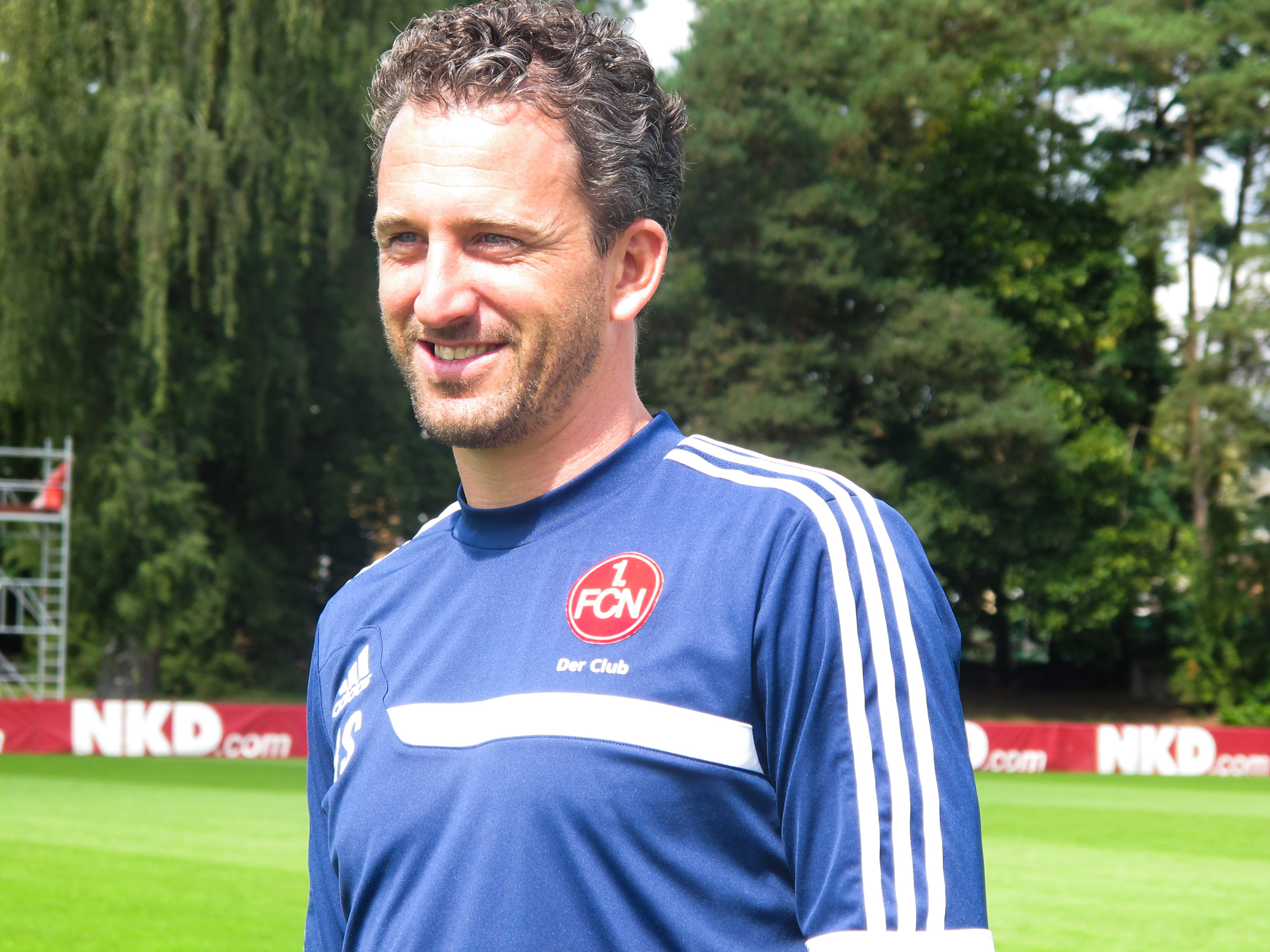 Roger Stilz, Co-Trainer 1. FC Nürnberg 2014